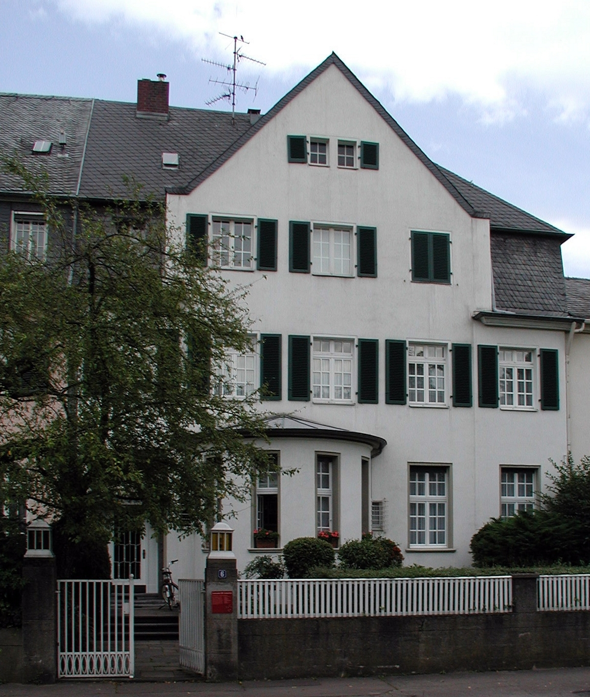 Ehemaliges Wohnhaus Konrad Adenauers, Max-Bruch-Straße 6, Köln-Lindenthal